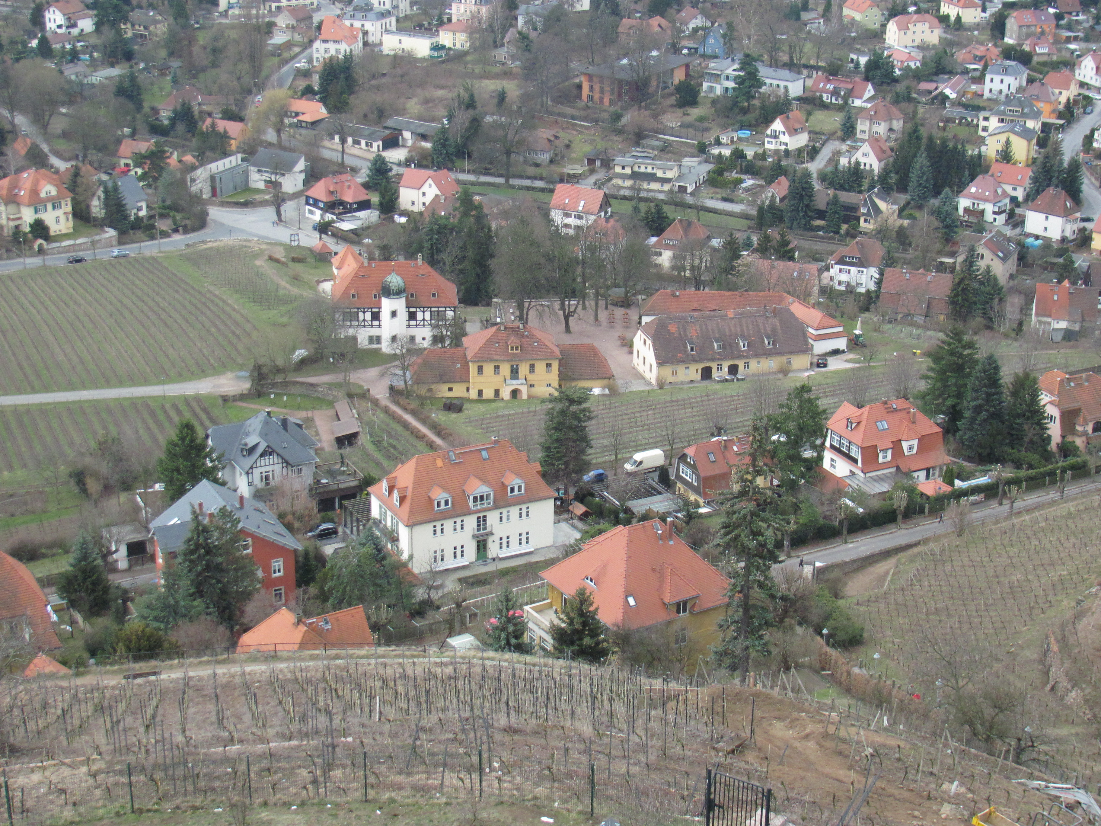 Bismarckturm (Radebeul), Befahrung 2013